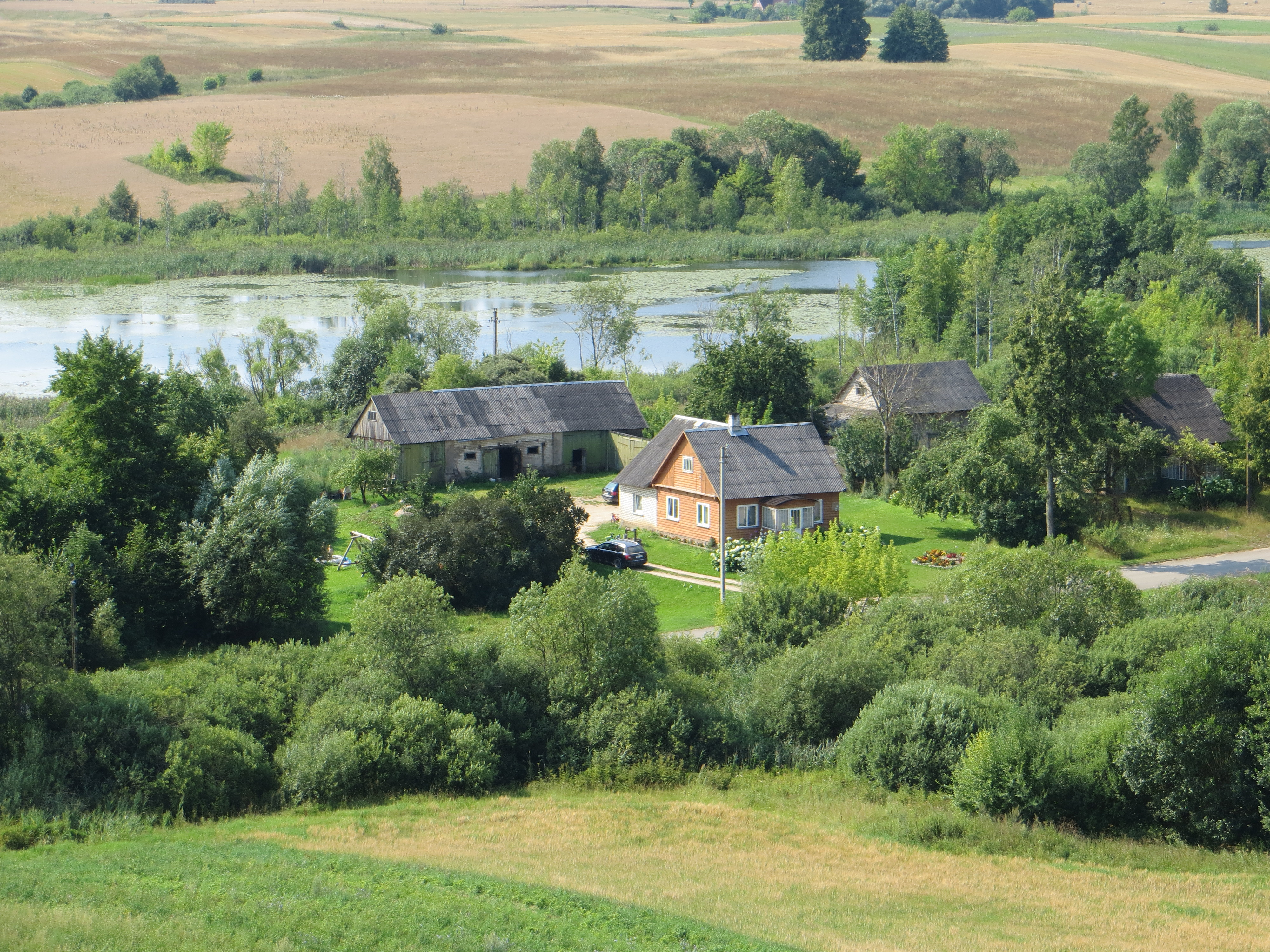 Veisiejų sen., Lithuania